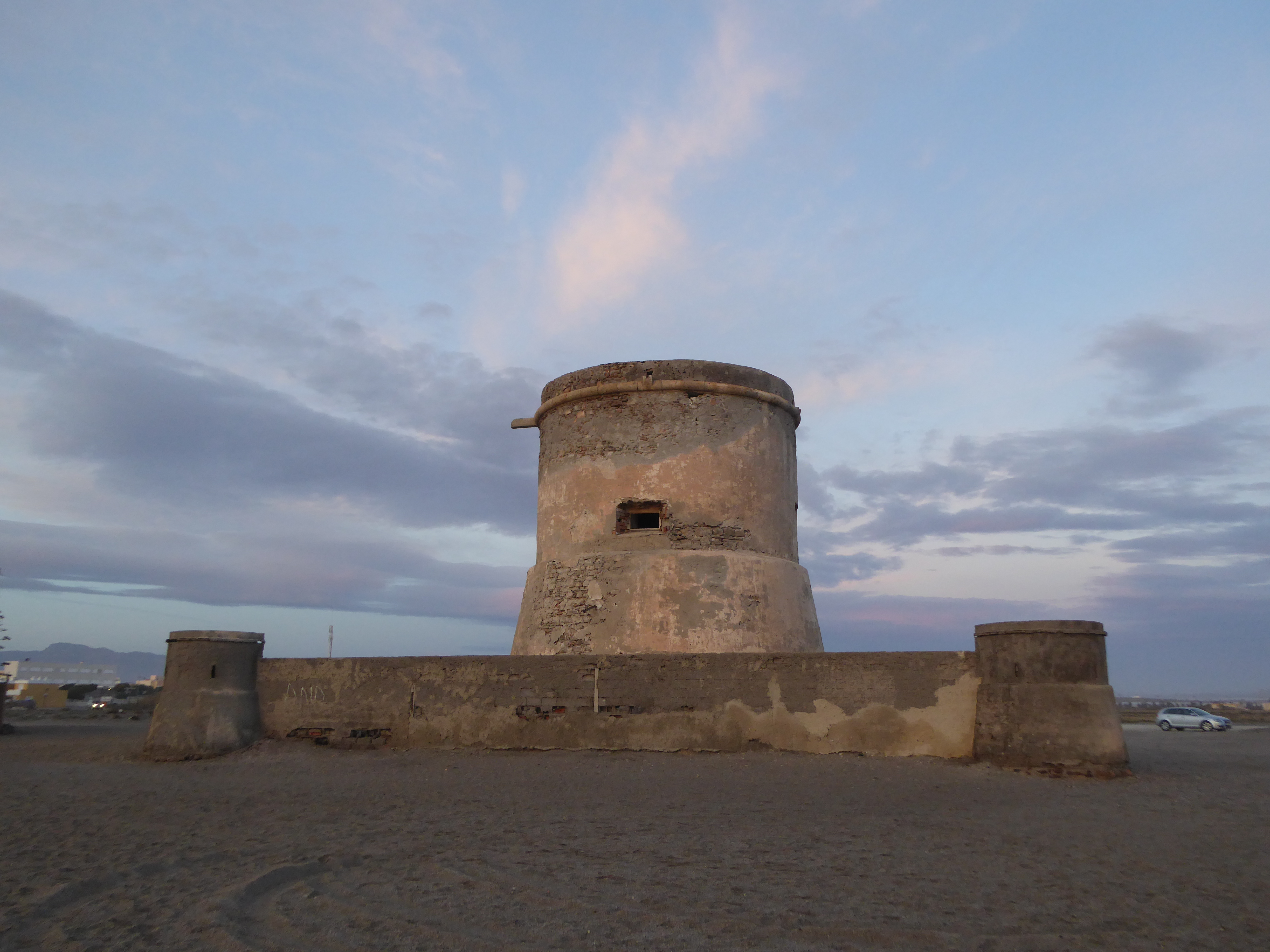 Torre de San Miguel, en el parque natural de Cabo de Gata - Níjar This is a photography of a Special Area of Conservation in Spain with the ID: ES0000046. Natura2000 entry, EEA entry